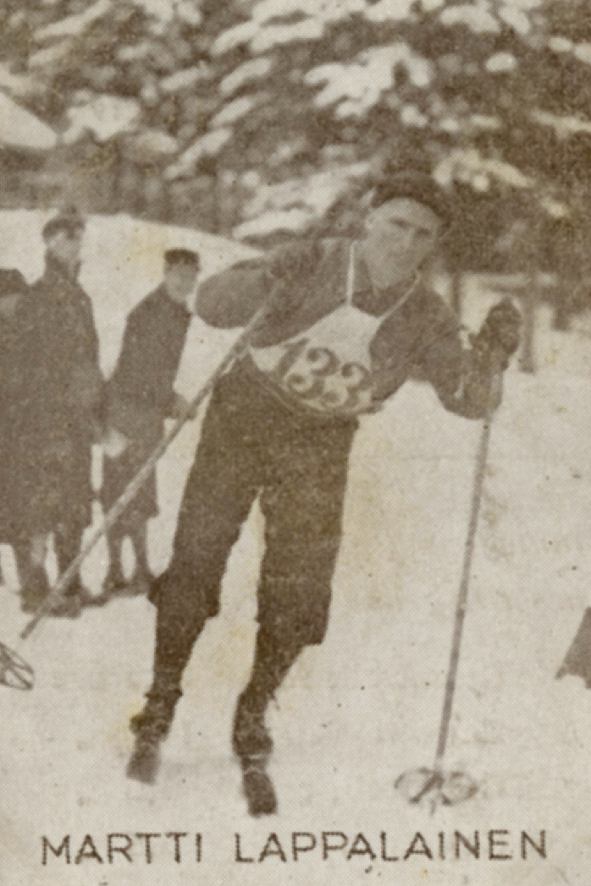 Format: Samlekort Dato / Date: ca. 1930 (dokumentet) Fotograf / Photographer: Ukjent Wikipedia: Martti Lappalainen (1902 - 1941) Eier / Owner Institution: Trondheim byarkiv, The Municipal Archives of Trondheim Arkivreferanse / Archive reference: Sportsklubben Freidig: Sigarettfoto ca. 1930 (Løpenr. 75) F23954 Tekst på baksiden: Martti Lappalainen hadde det utakknemlige hverv å være stor favoritt ved årets 50 kilometer i Holmenkollen 1929 efter sin seier 1928. Han maktet ikke å gjenta sin bedrift men leverte en respektabel prestasjon og var best av sine landsmenn. Han blev denne gang nr. 7. Merknad: Disse samlekortene med bilder av norske og internasjonale idretthelter fulgte med i sigarettpakker på 1920 og 30-tallet - derav tobakksreklamen på baksiden. Samlekortene kommer fra Sportsklubben Freidigs arkiv, og inneholder nærmere 90 unike kort pent plassert i et samlealbum. Samleren var den senere skipsmegler Finn Følling (1914 – 1985).